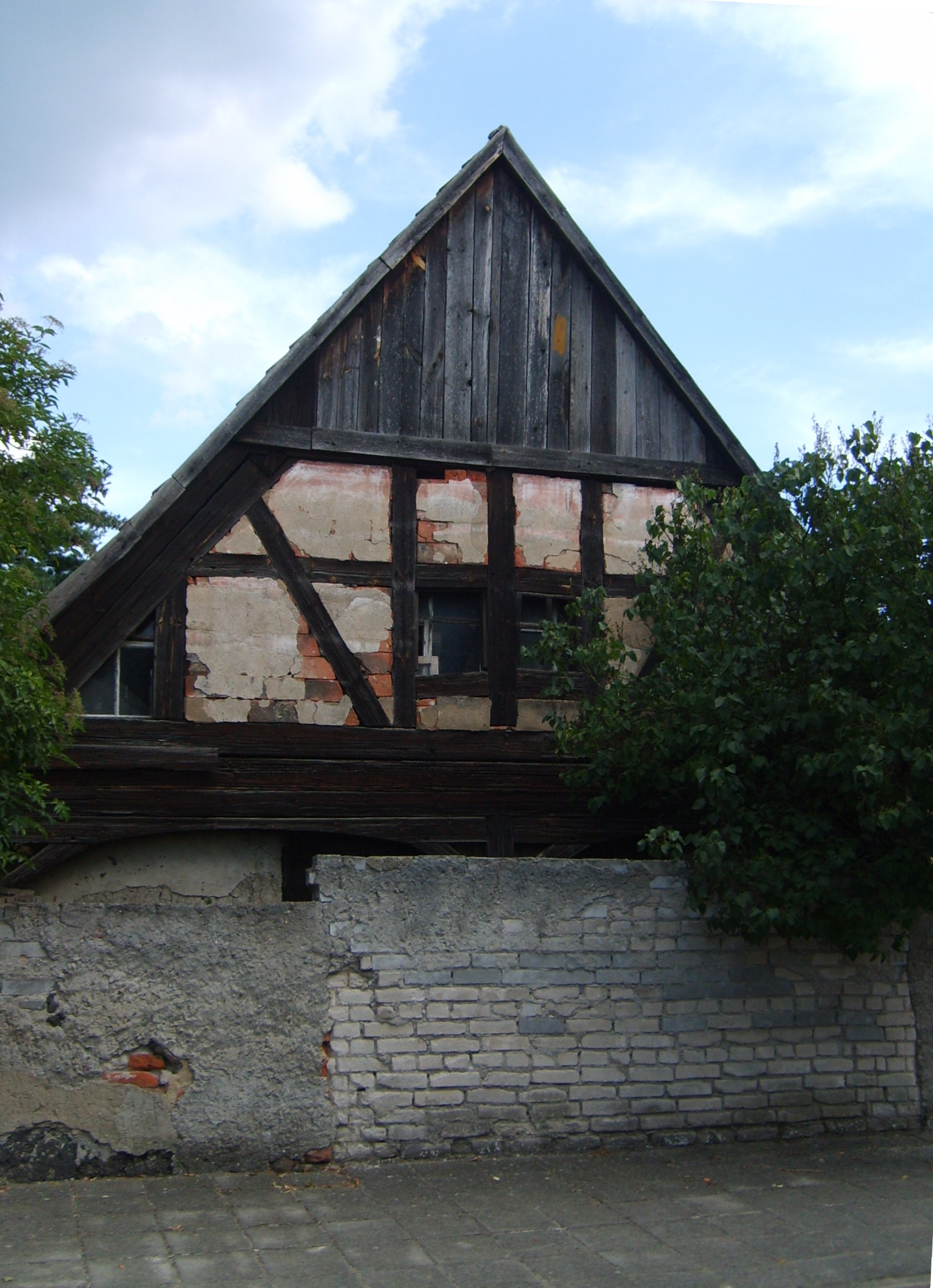 Fachwerkhaus in Würdenhain